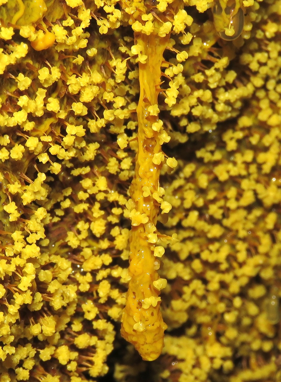 Sporification du physarum polycephalum.